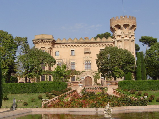 Castell de Sant Marçal. Restaurat el 1895 per Gaietà Buïgas i Monravà